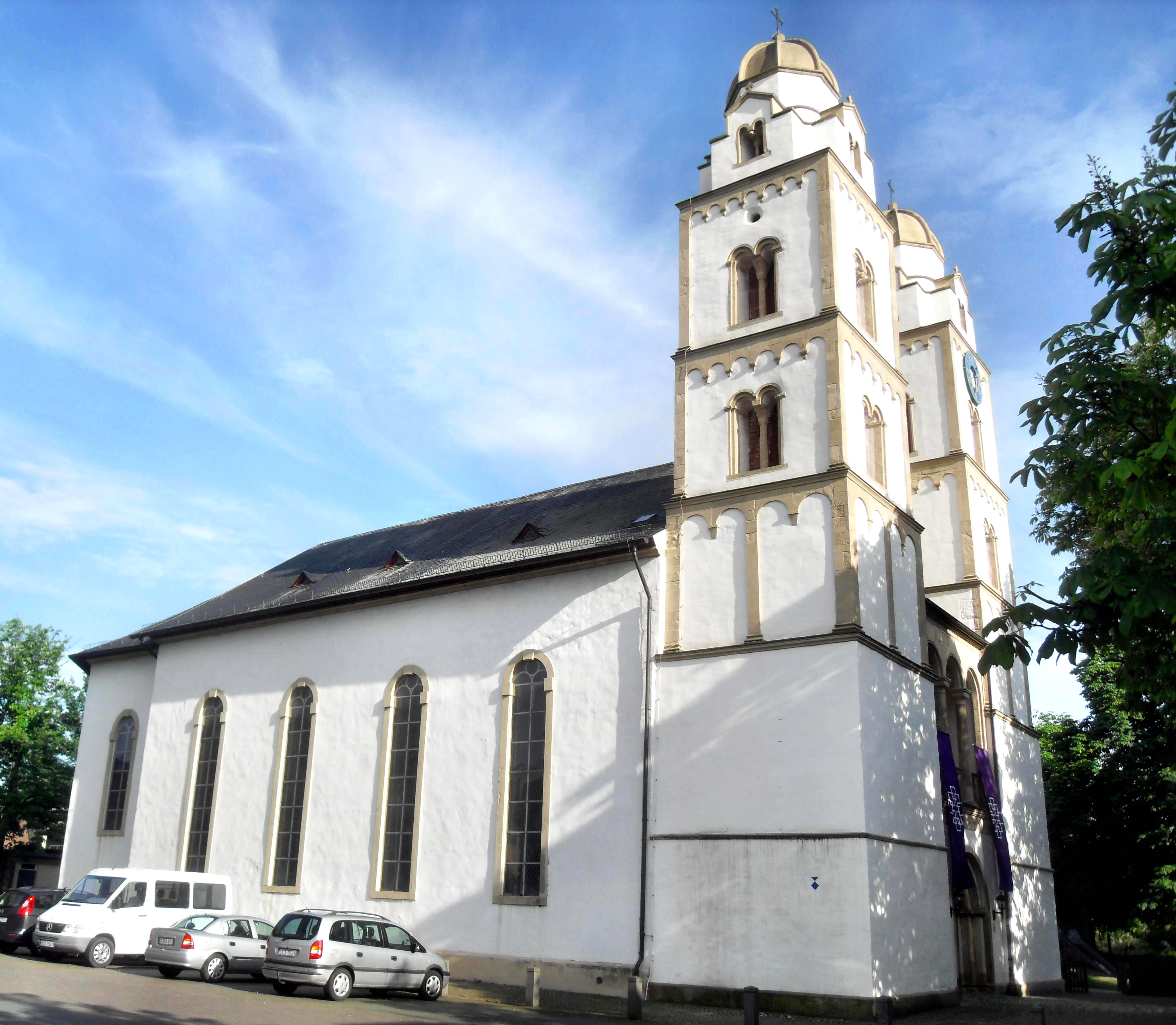 Die evangelische Kirche Guntersblums vom Marktplatz aus gesehen.